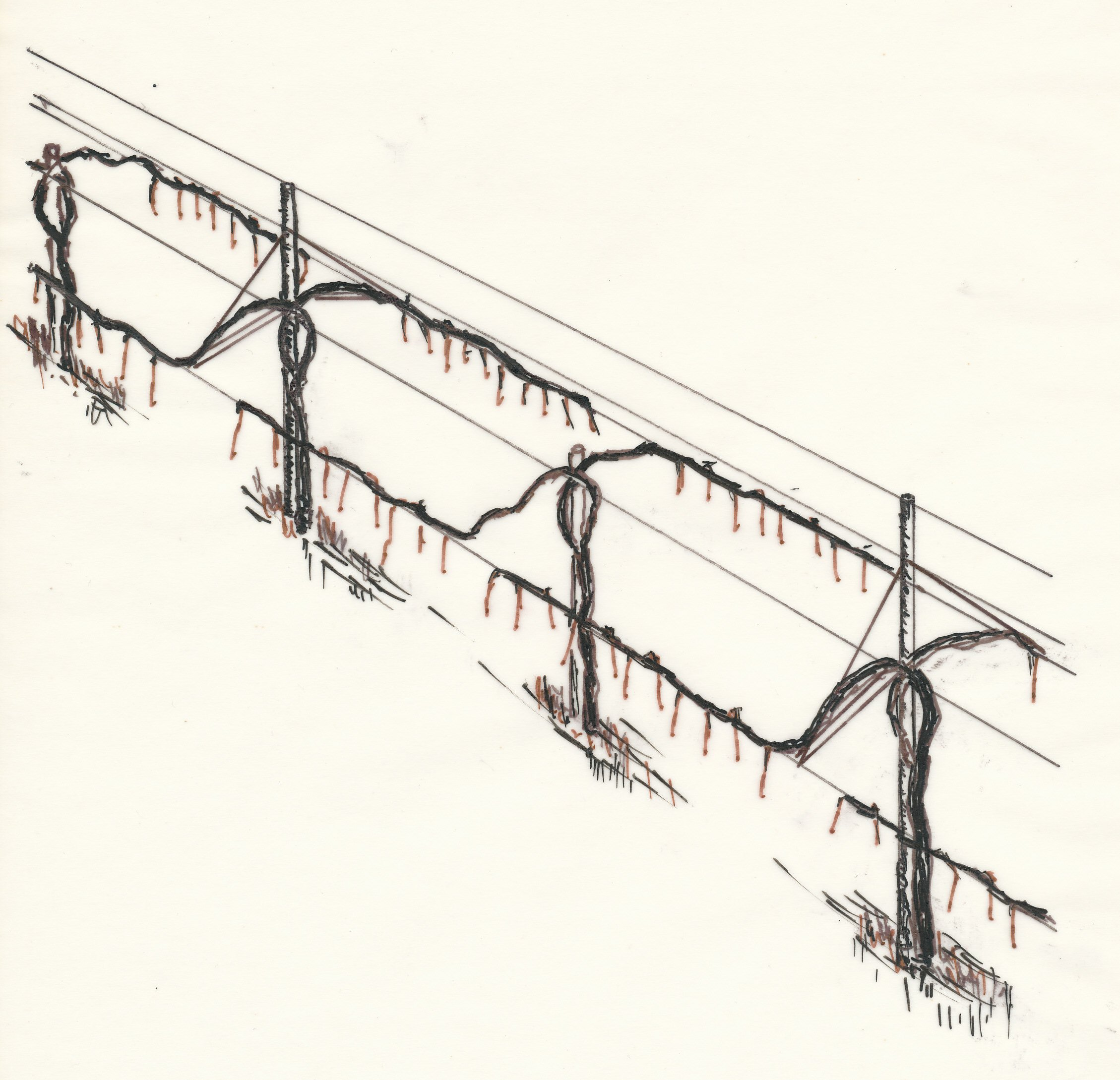 Schrägansicht eines GDCRebenerziehungssystems